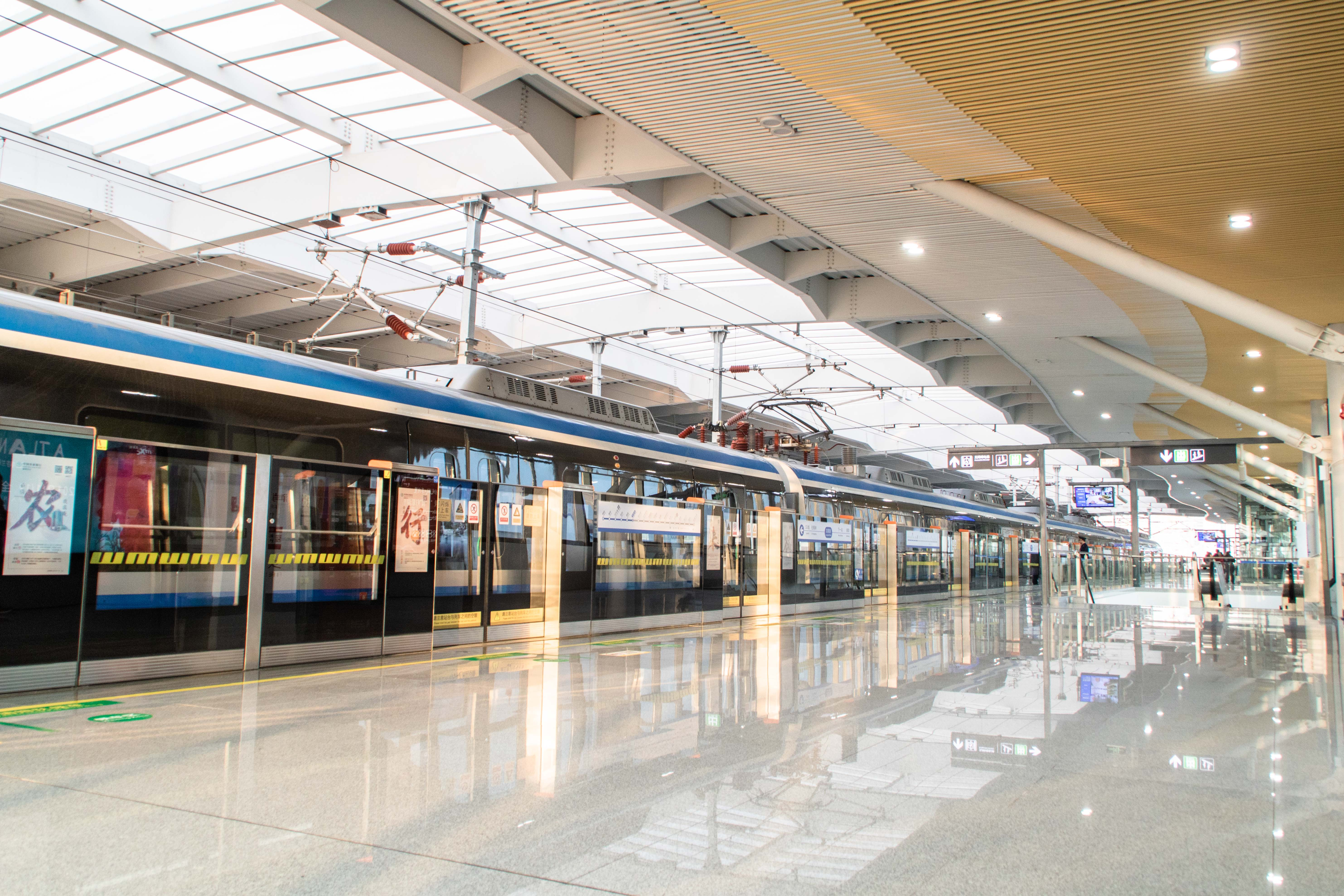 中文（中国大陆）: 龙霞路站站台